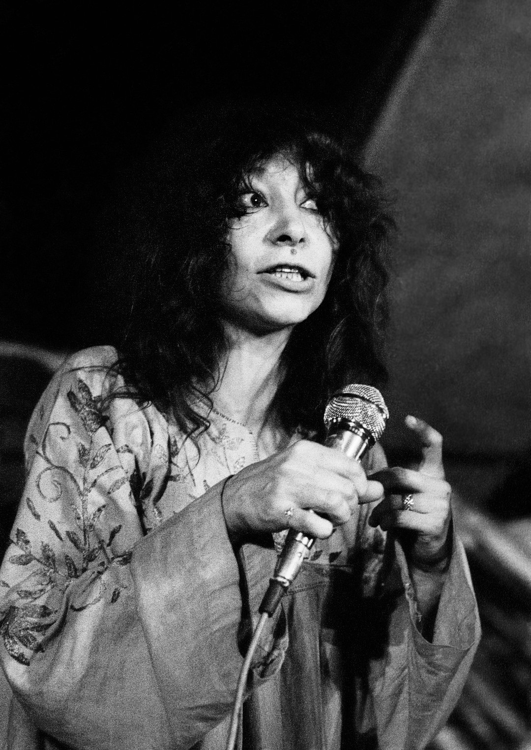 Brigitte Fontaine, Fête du PSU,Colombes, 1973